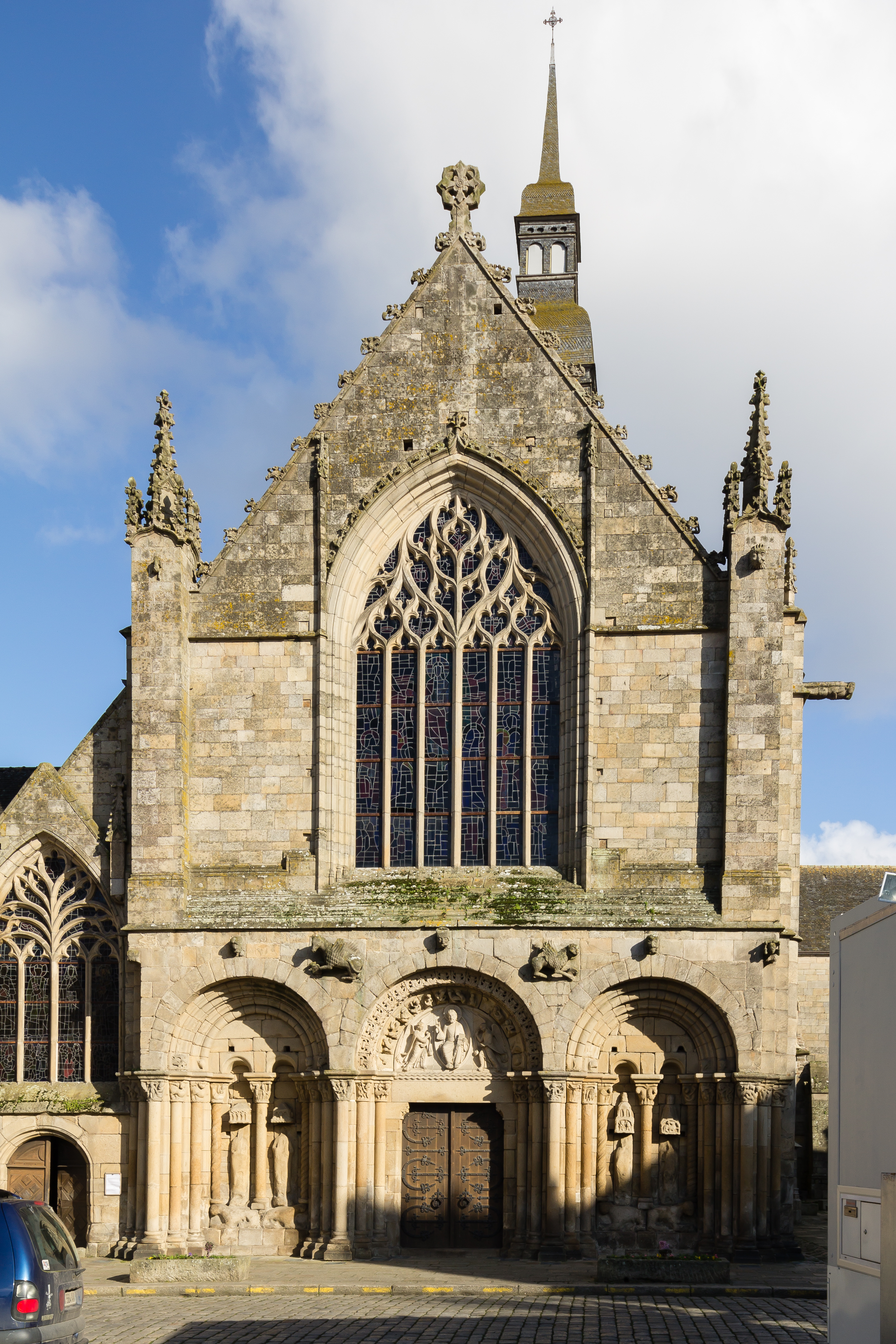 Façade de la basilique Saint-Sauveur de Dinan (France)